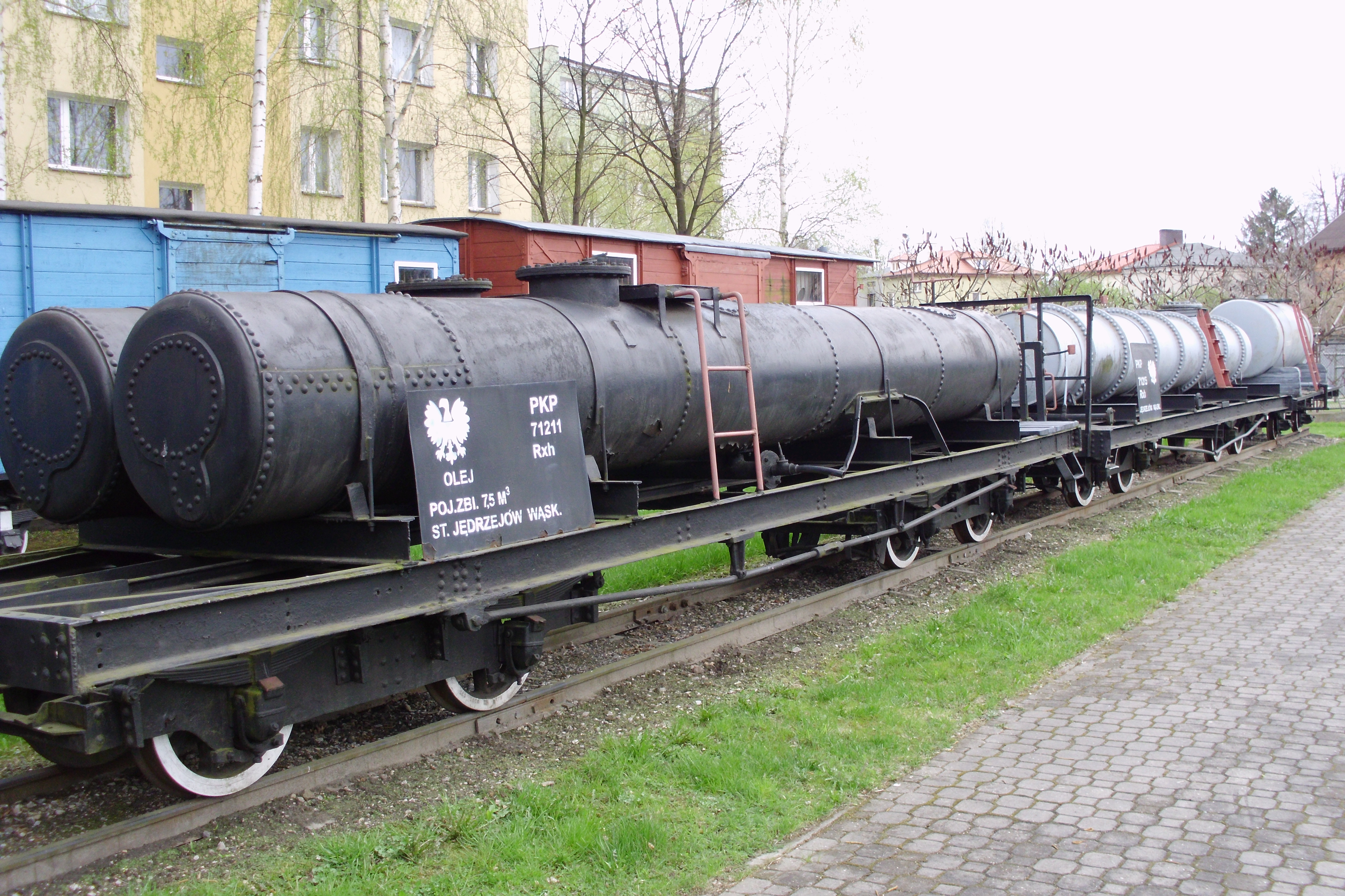 Muzeum Kolei Wąskotorowej w Sochaczewie. Zbiorniki do przewozu oleju.